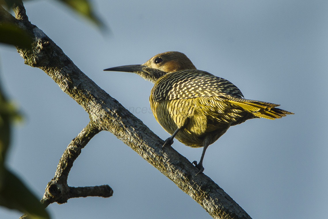 Fernandina's Flicker - Cuba_S4E0064